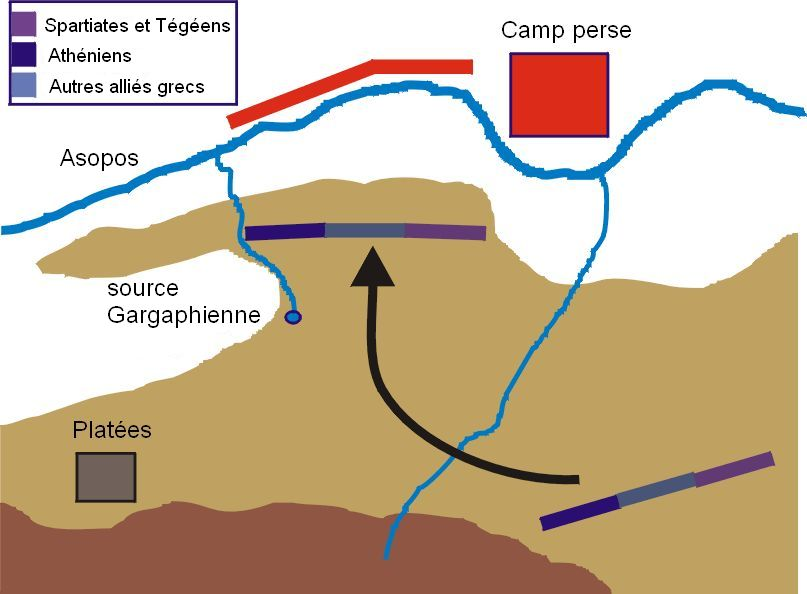 Première phase de la bataille de Platées